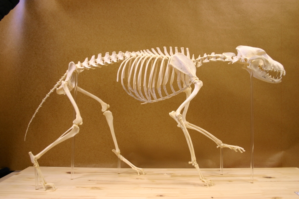 Archaeozoology עצמות בעלי חיים שנמצא בחפירה ארכאולוגית פרהיסטורית שלד זאב (נבנה על ידי רועי שפיר) מאוספי המעבדה לארכאוזואולוגיה באוניברסיטת חיפה